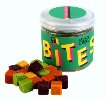 Tai inovacija džiovinimo šaltyje maisto produktų gamyboje, kai keli produktai naudojant tam tikras technologijas yra apjungiami į vieną maistinį kubelį.